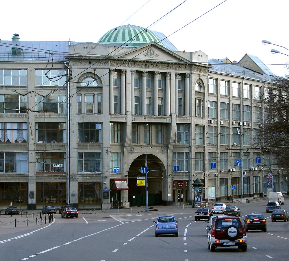 Varvarskye Gates Square in Moscow. "Delovoy Dvor" (Business Court) offices, 1911-1913, by Ivan Kuznetsov (1867-1942)Площадь Варварские Ворота в Москве. "Деловой Двор", построенный И. С. Кузнецовым в 1911-1913 по заказу Н. А. Второва. Примерно под указателем "прямо и направо" находилась крепостная башня Китай-города с Варварскими воротами.